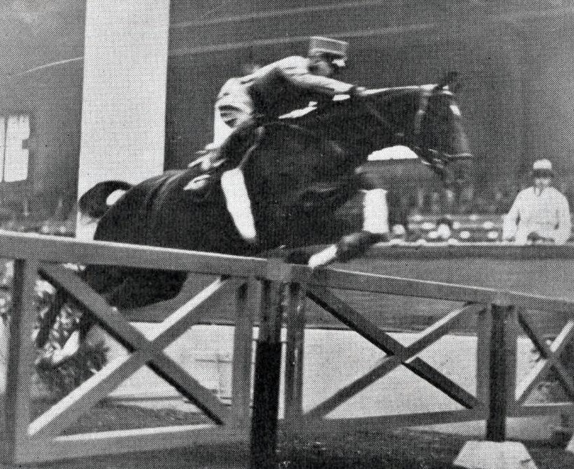 Le lieutenant suisse Alphonse Gemuseus, sur 'Galantin' en juin 1927.